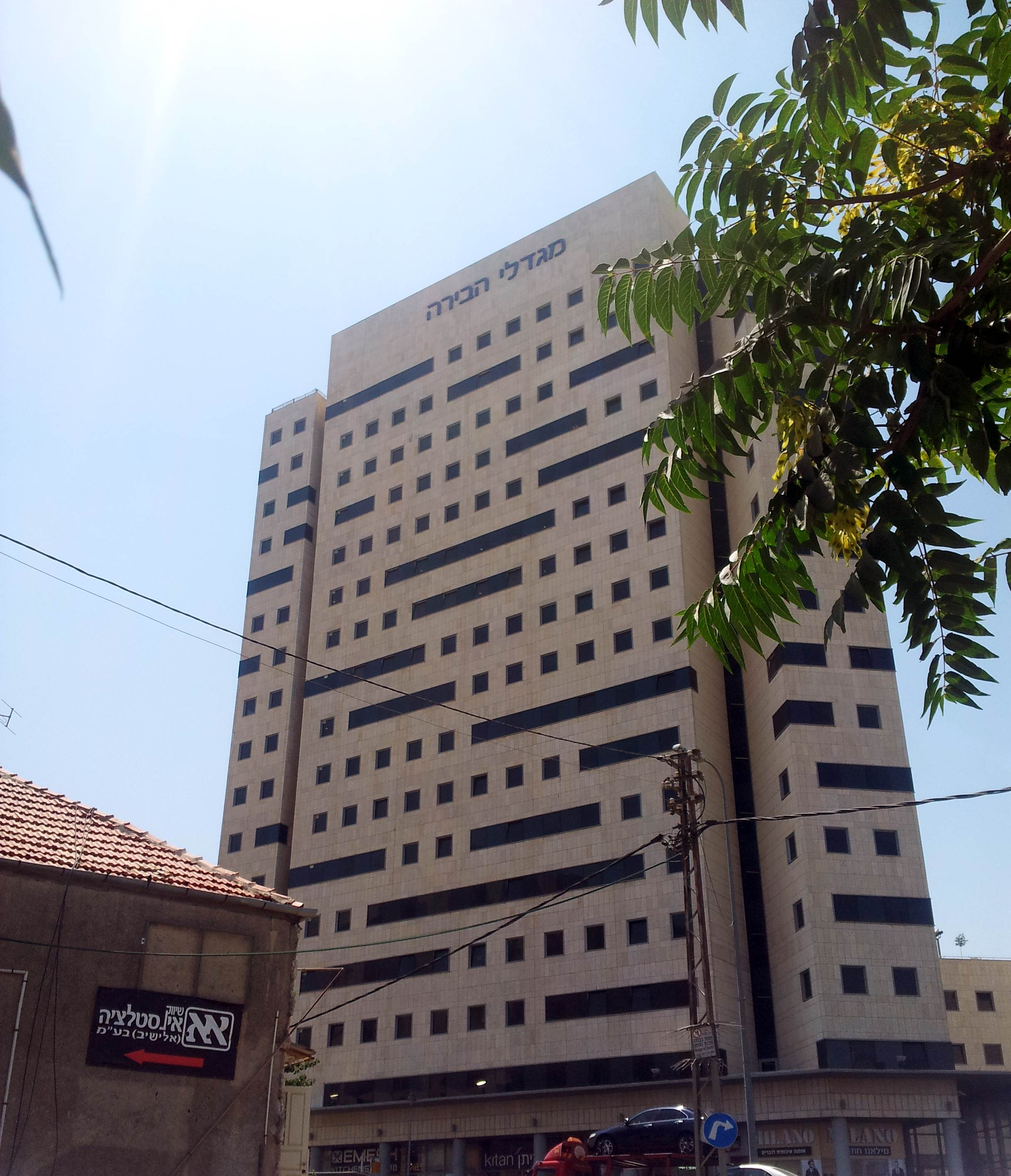 מגדלי הבירה